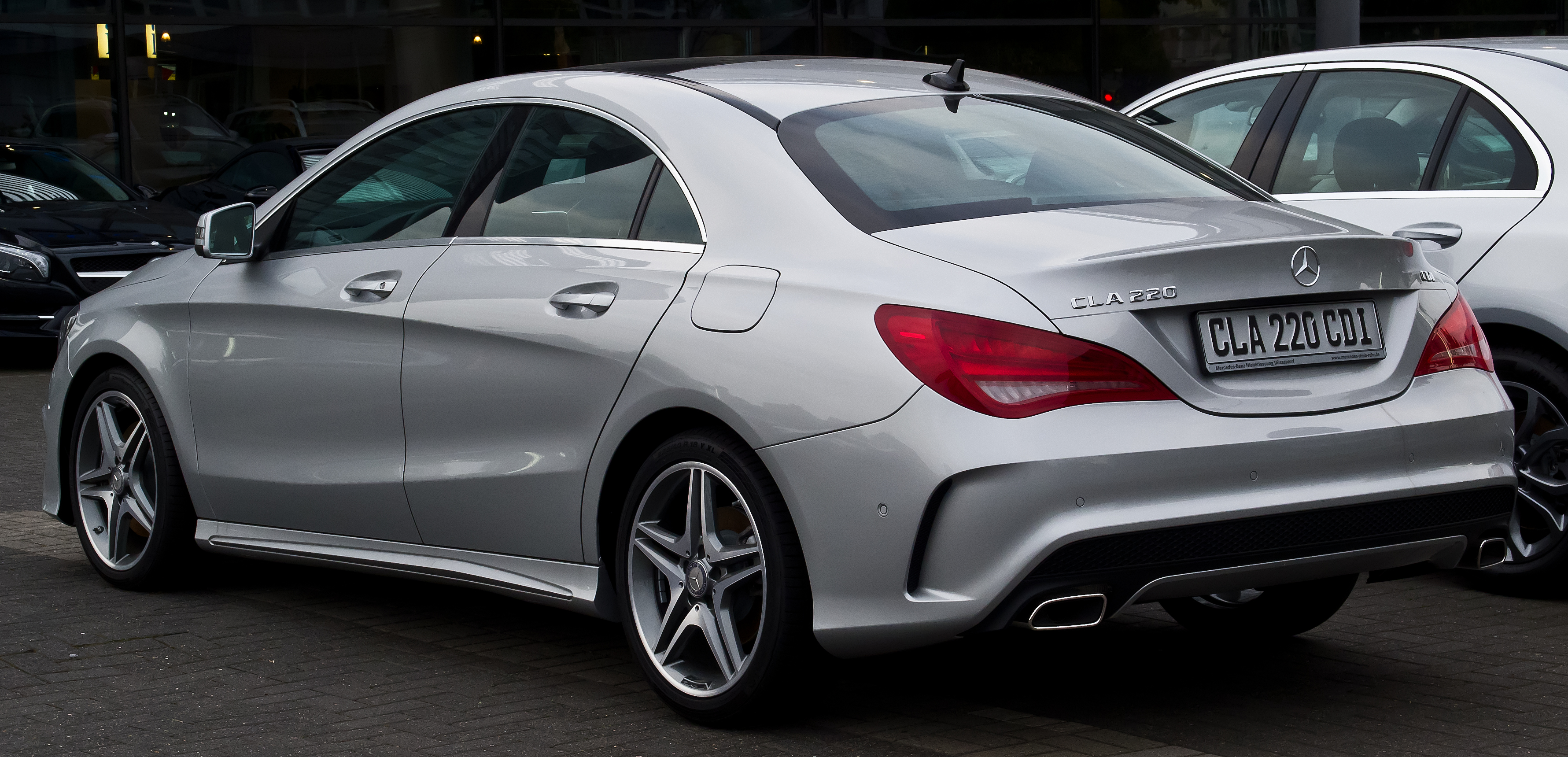 Mercedes-Benz CLA 220 CDI AMG Line (C 117)